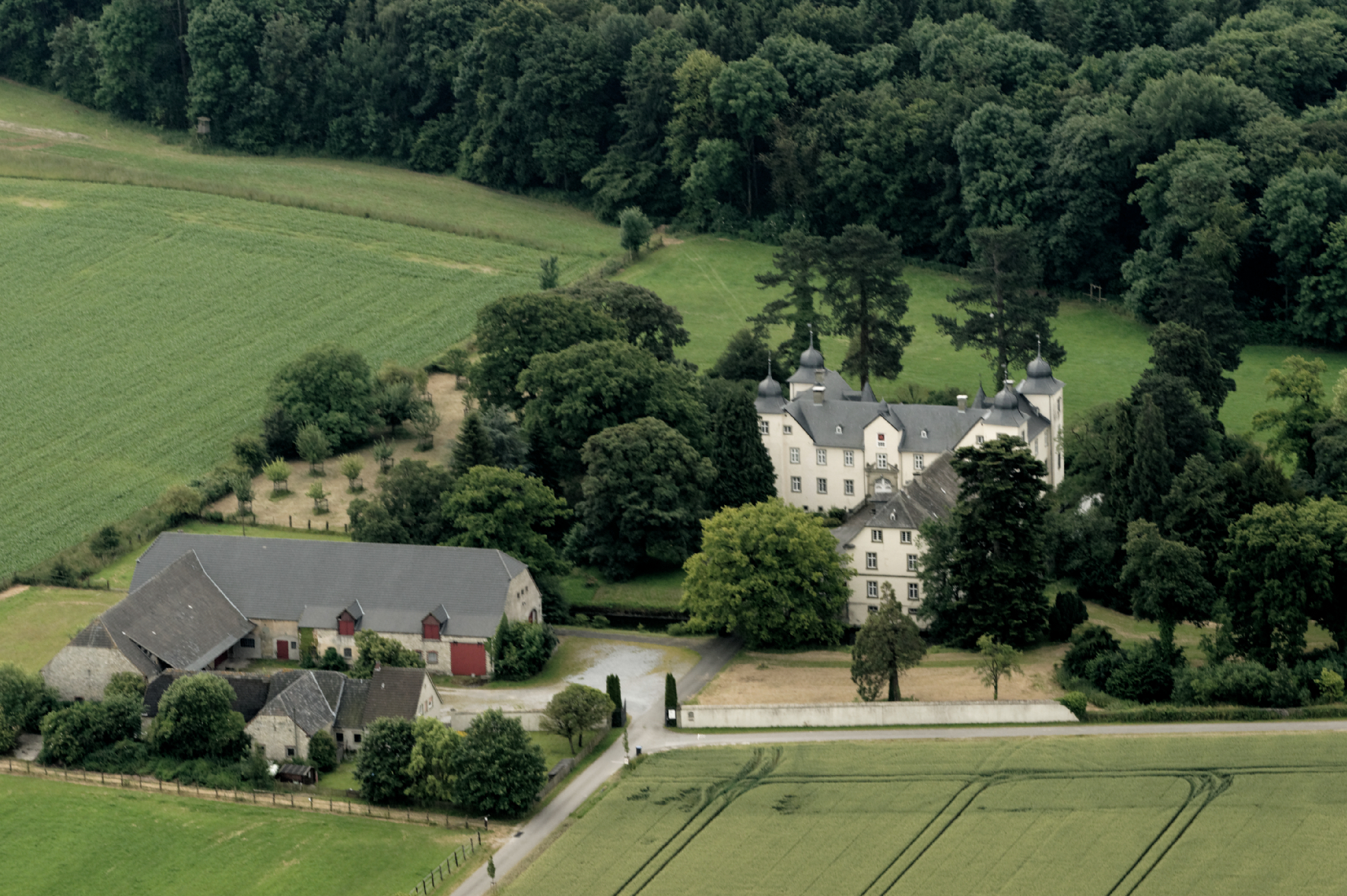 Schloss Eggeringhausen in Anröchte-Mellrich. Fotoflug Sauerland Nord. The making of this document was supported by the Community-Budget of Wikimedia Germany.